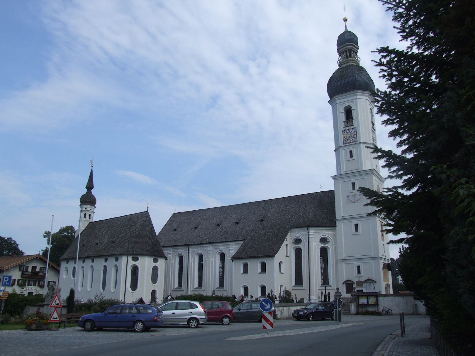 St. Andreas Native nameSt. AndreasLocationElbach bei Fischbachau, Upper Bavaria, GermanyCoordinates47° 44′ 30″ N, 11° 57′ 07″ E วัดเซนต์แอนดรูว์, เอลบาค, ฟิชคบาคเคา, บาวาเรีย, เยอรมนี Pfarrkirche St. Andreas, Elbach, Fischbachau im Landkreis Miesbach, Deutschland Church of St. Andrews, Elbach, Fischbachau, Miesbach, Bavaria, Germany